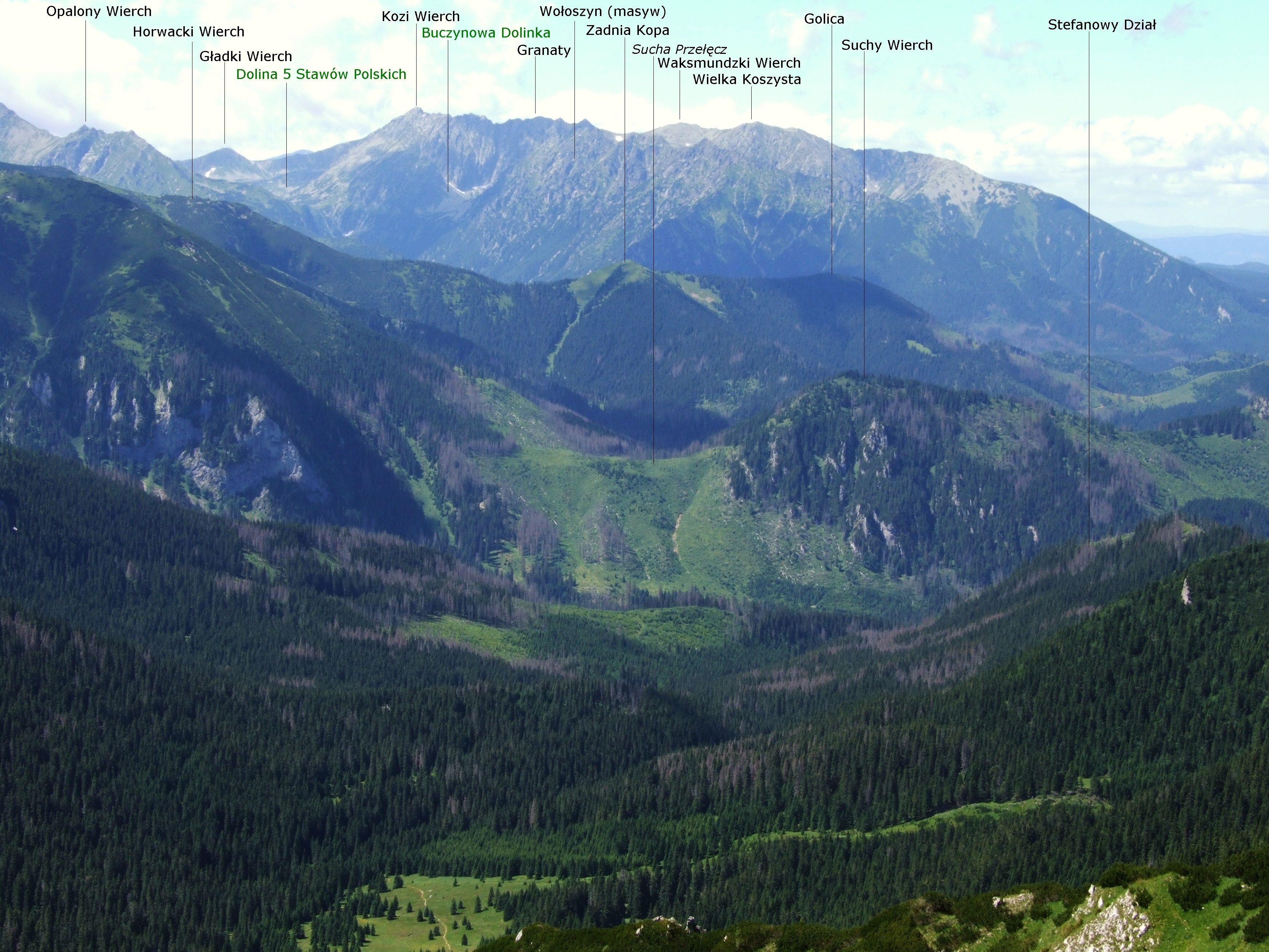 Widok z okolic Szalonego Przechodu